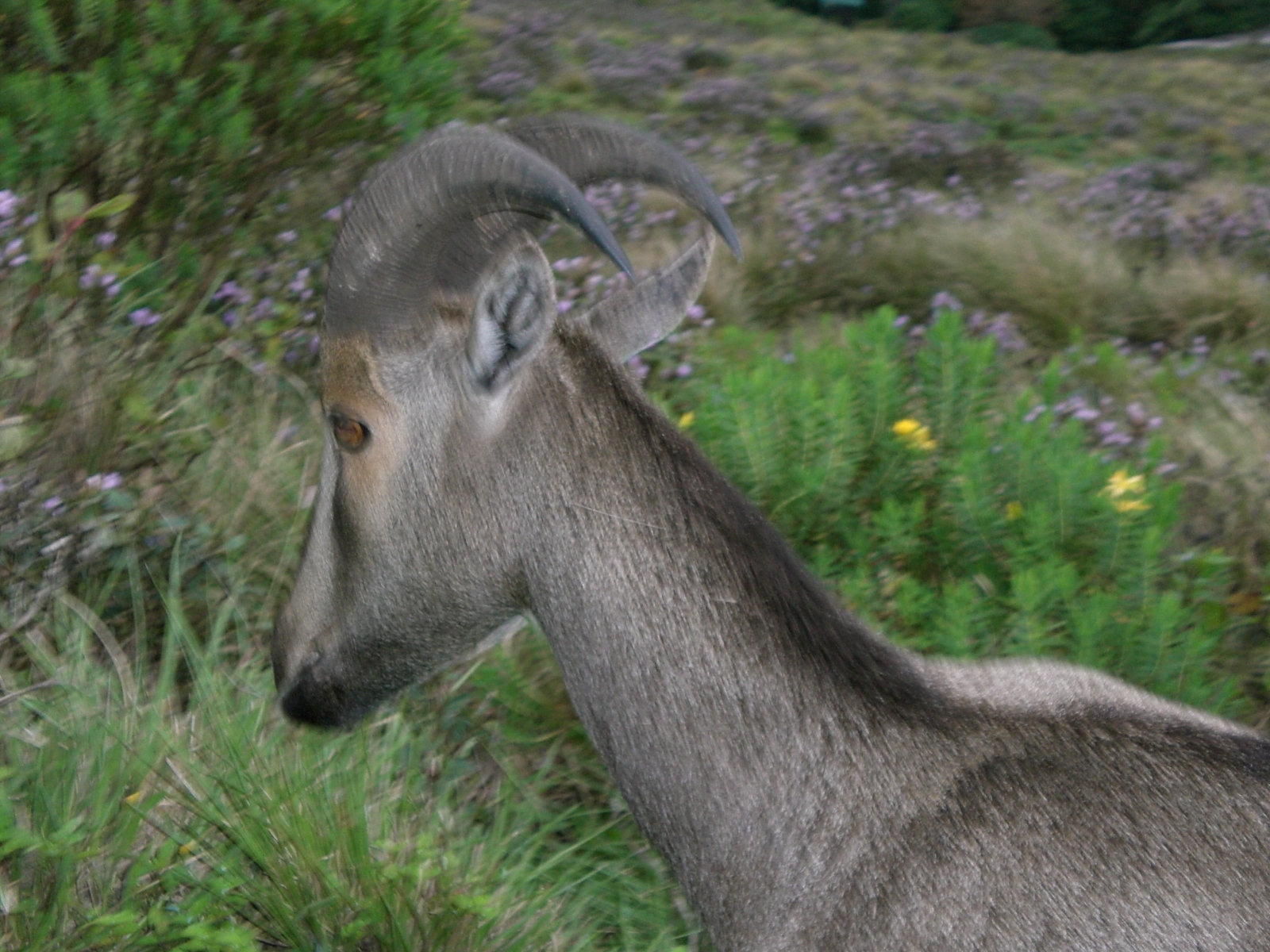 കേരളത്തിലെ മൂന്നാർ- രാജാമലയിലുള്ള വംശനാശം വന്നുകൊണ്ടിരിക്കുന്ന വരയാട്